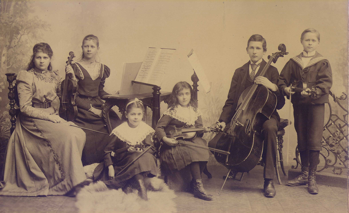 Fotografie der Michaelis-Geschwister: Melanie, Ella, Gertrud, Else, Alfred und Hans